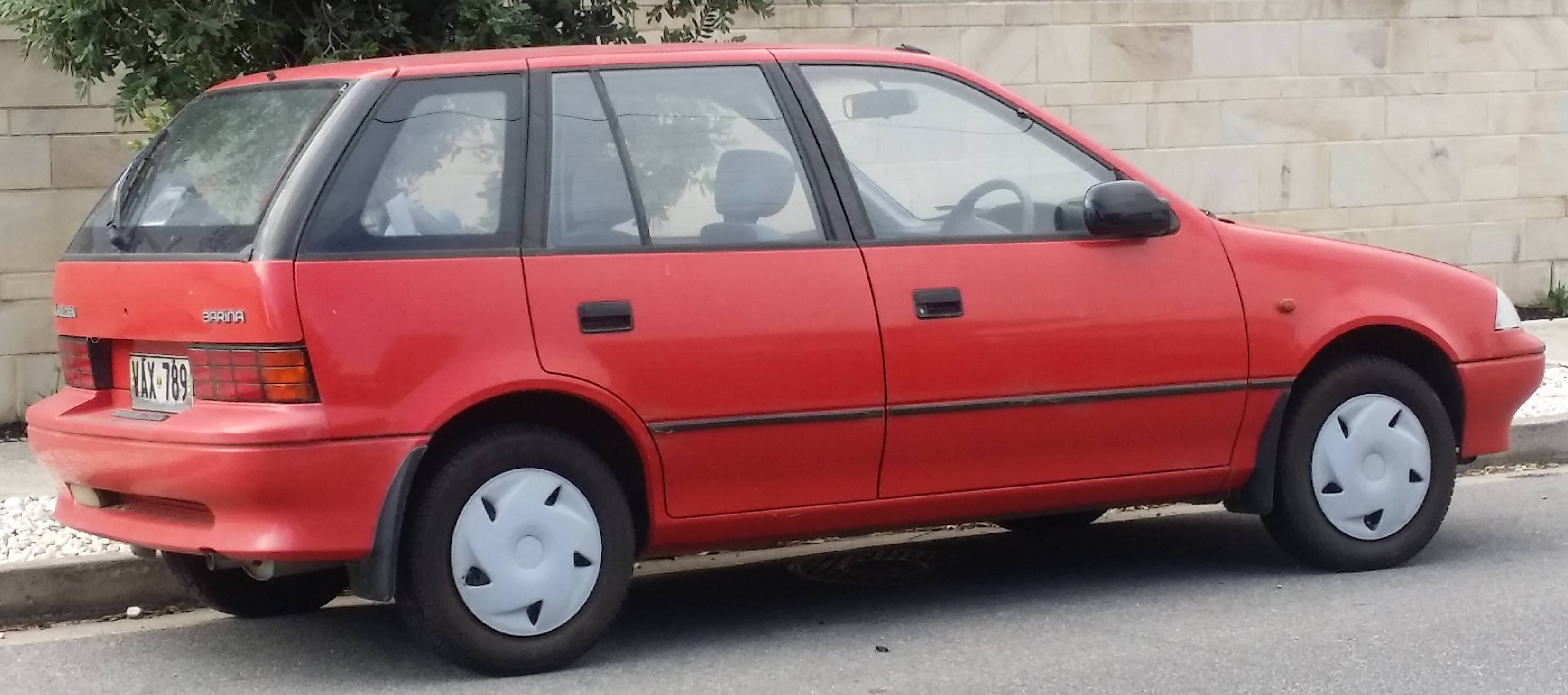 Holden Barina